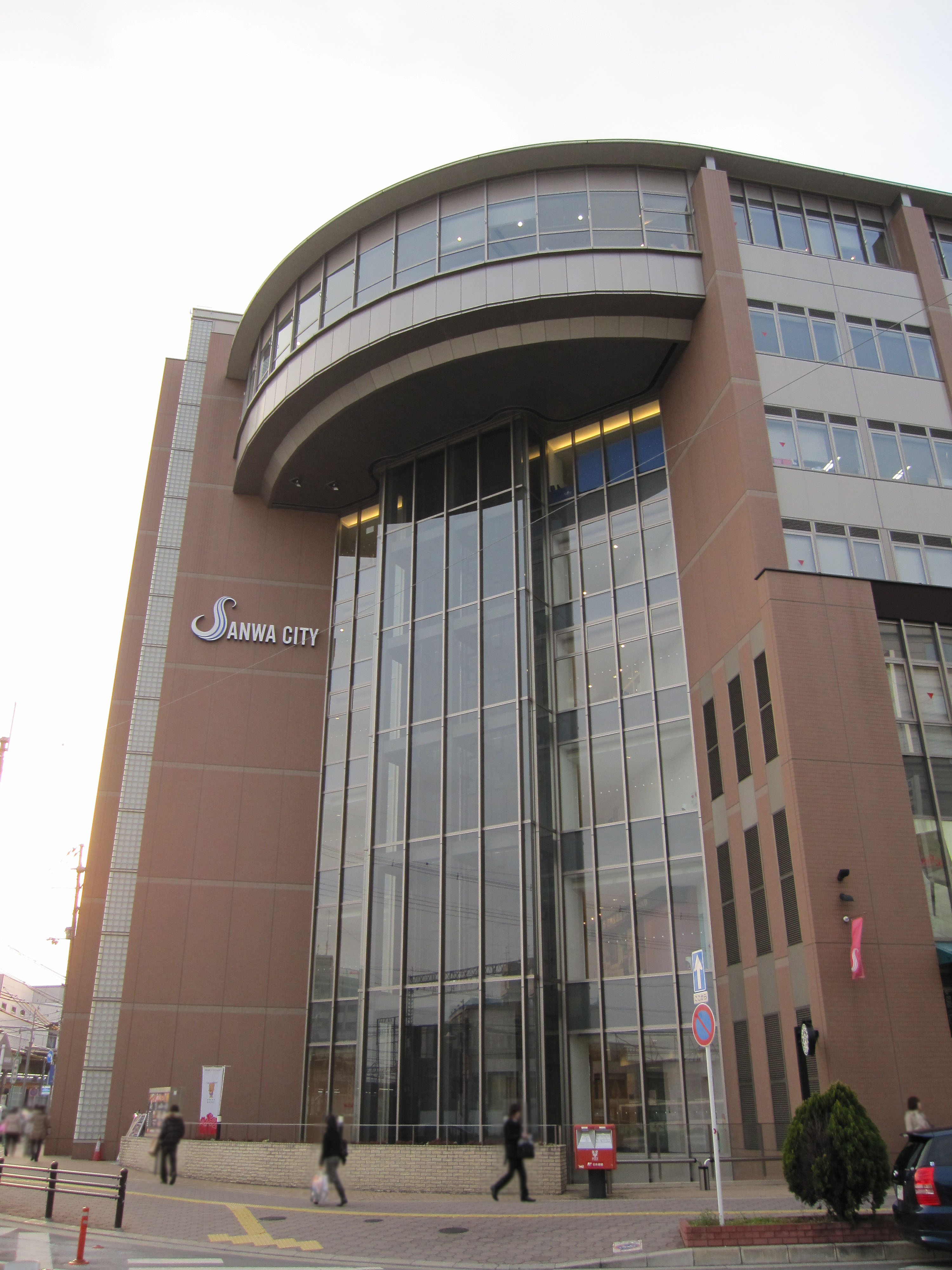 サンワシティ西大寺